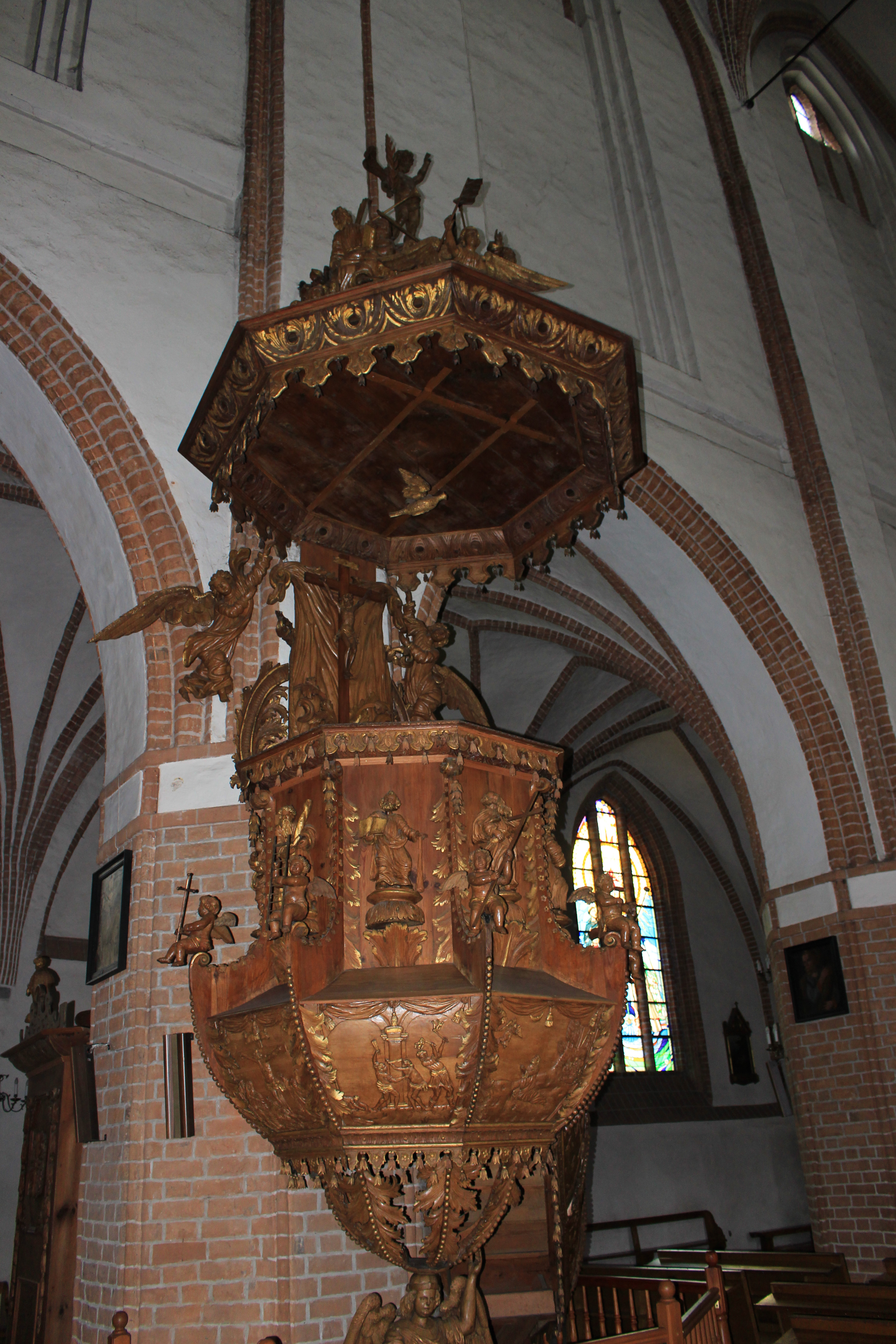 Kościół Matki Bożej Częstochowskiej - ambona